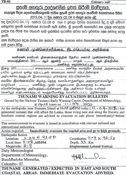 Sri lanka DMC evacuation order issued 11 April 2012 due to possible tsunami.